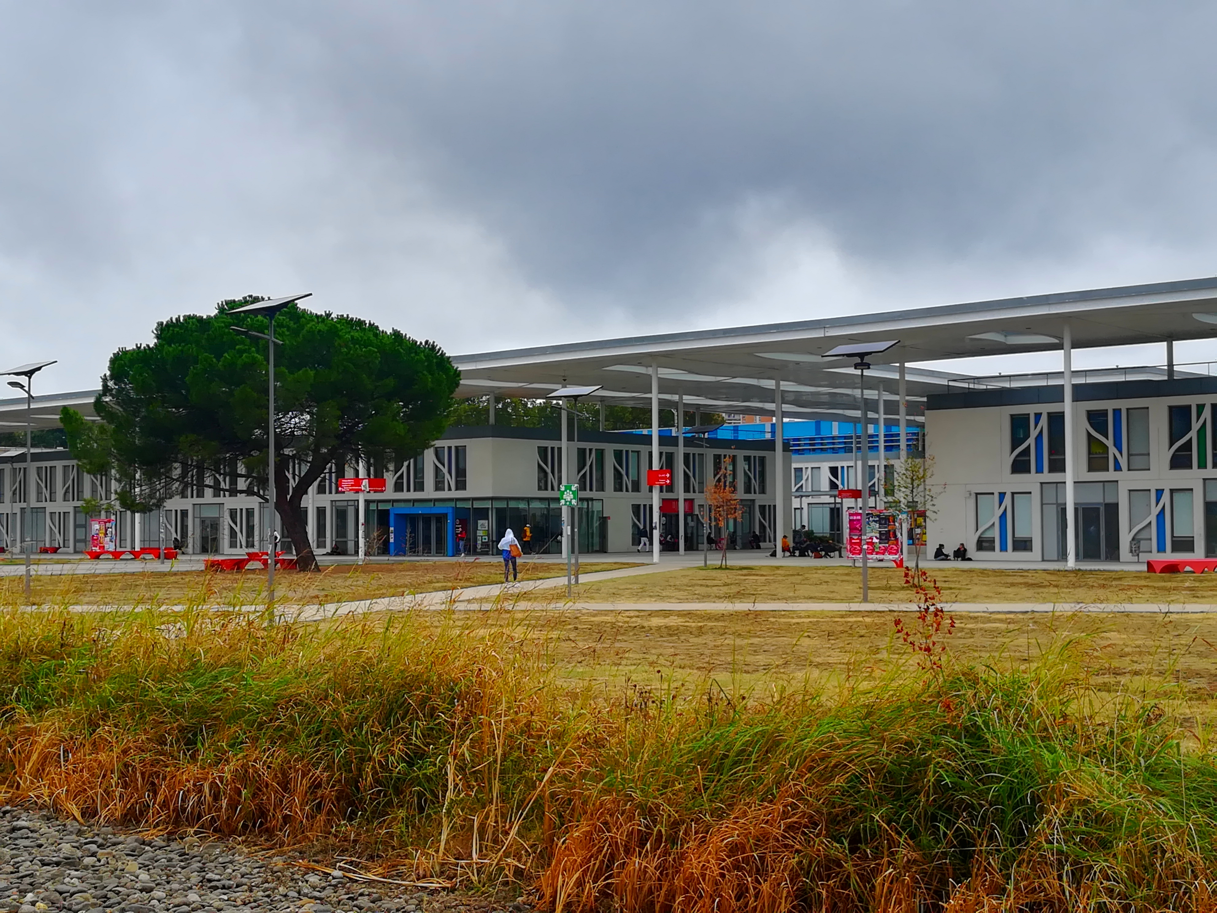 Le site de l'université du Mirail à Toulouse.